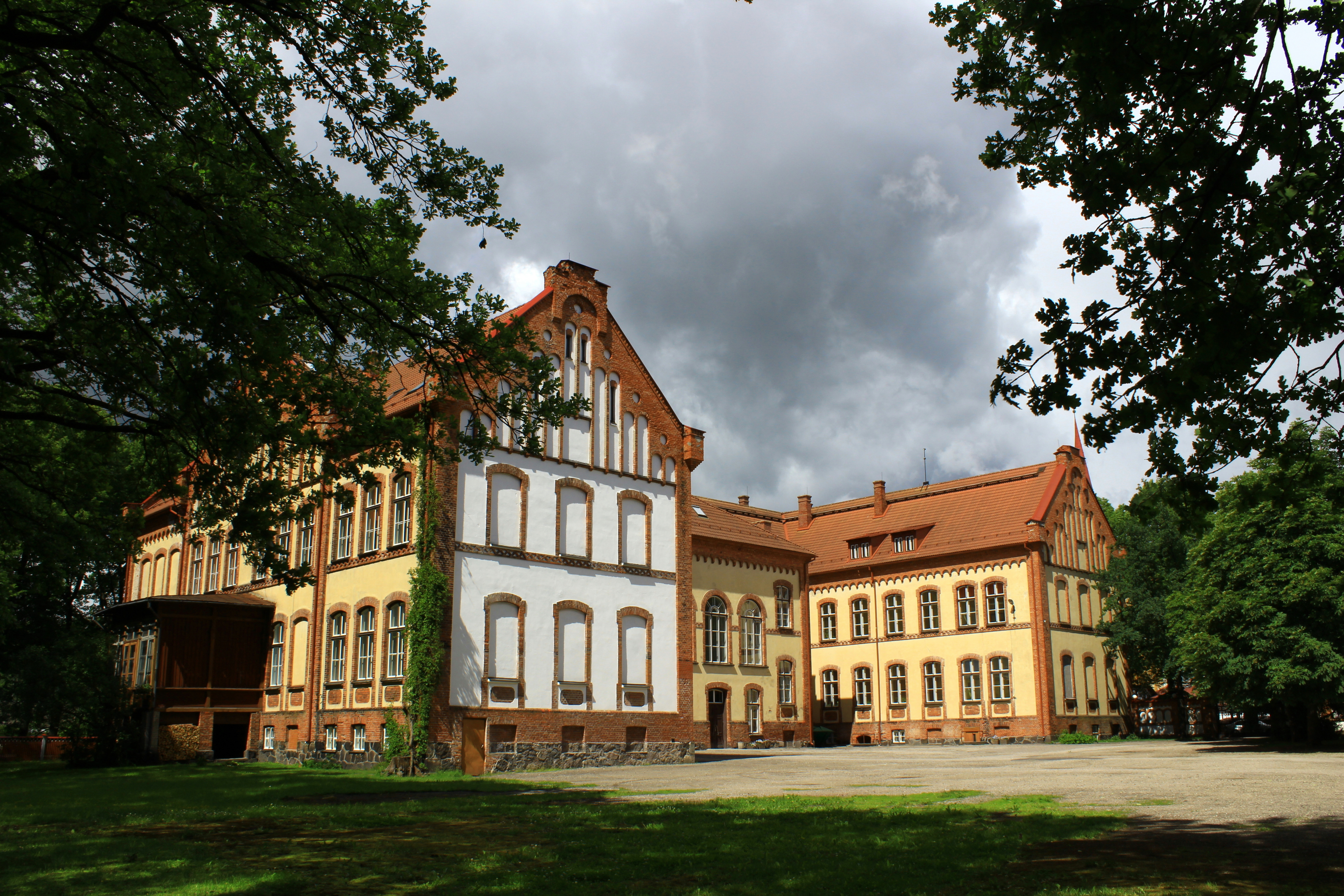 Pärnu tütarlastegümnaasiumi hoone